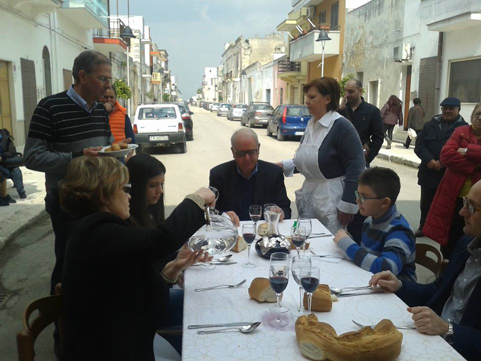 Tavolata dei santi che si tiene il giorno della festa di San Giuseppe